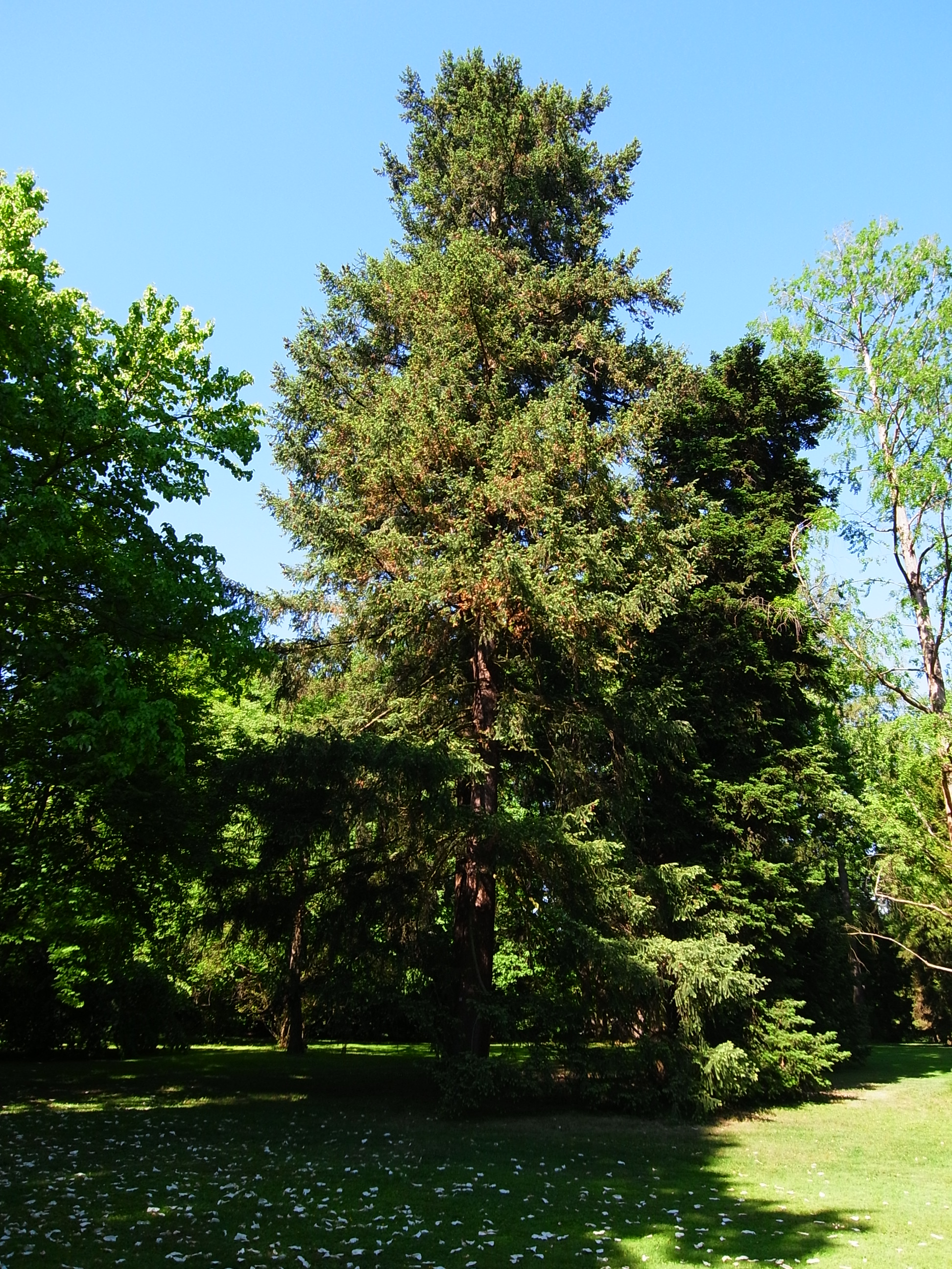 Kalifornische Douglasie (Pseudotsuga menziesii) im Landesarboretum Baden-Württemberg